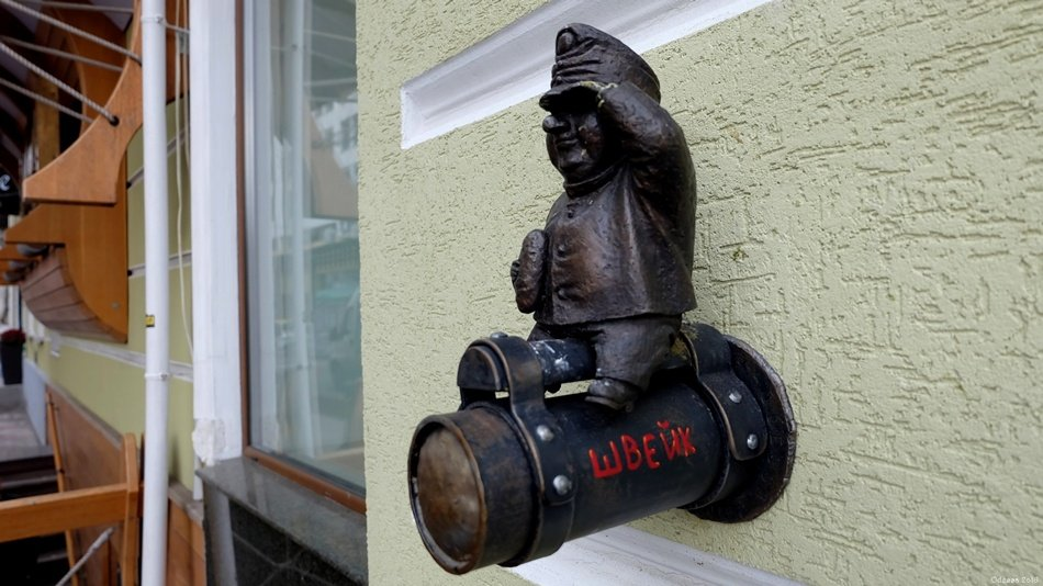 На фасаде Гамбринуса в центре Одессы появилась мини-скульптура чешскому литературному герою — бравому солдату Швейку